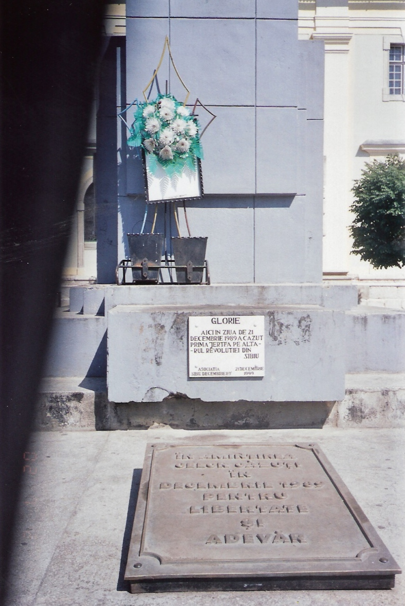 monument to 1989 uprising deads un sibiu